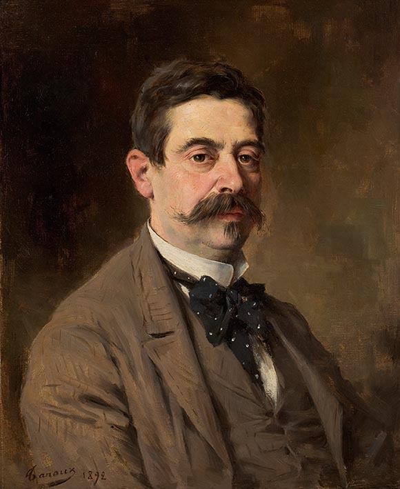 Fondateur galerie Lorenceau